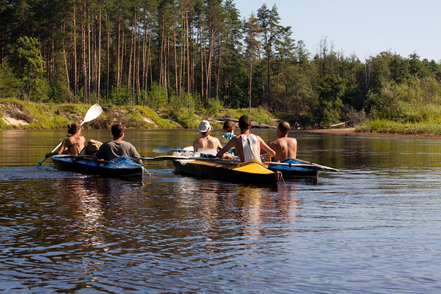 туристы на реке Большая Кокшага